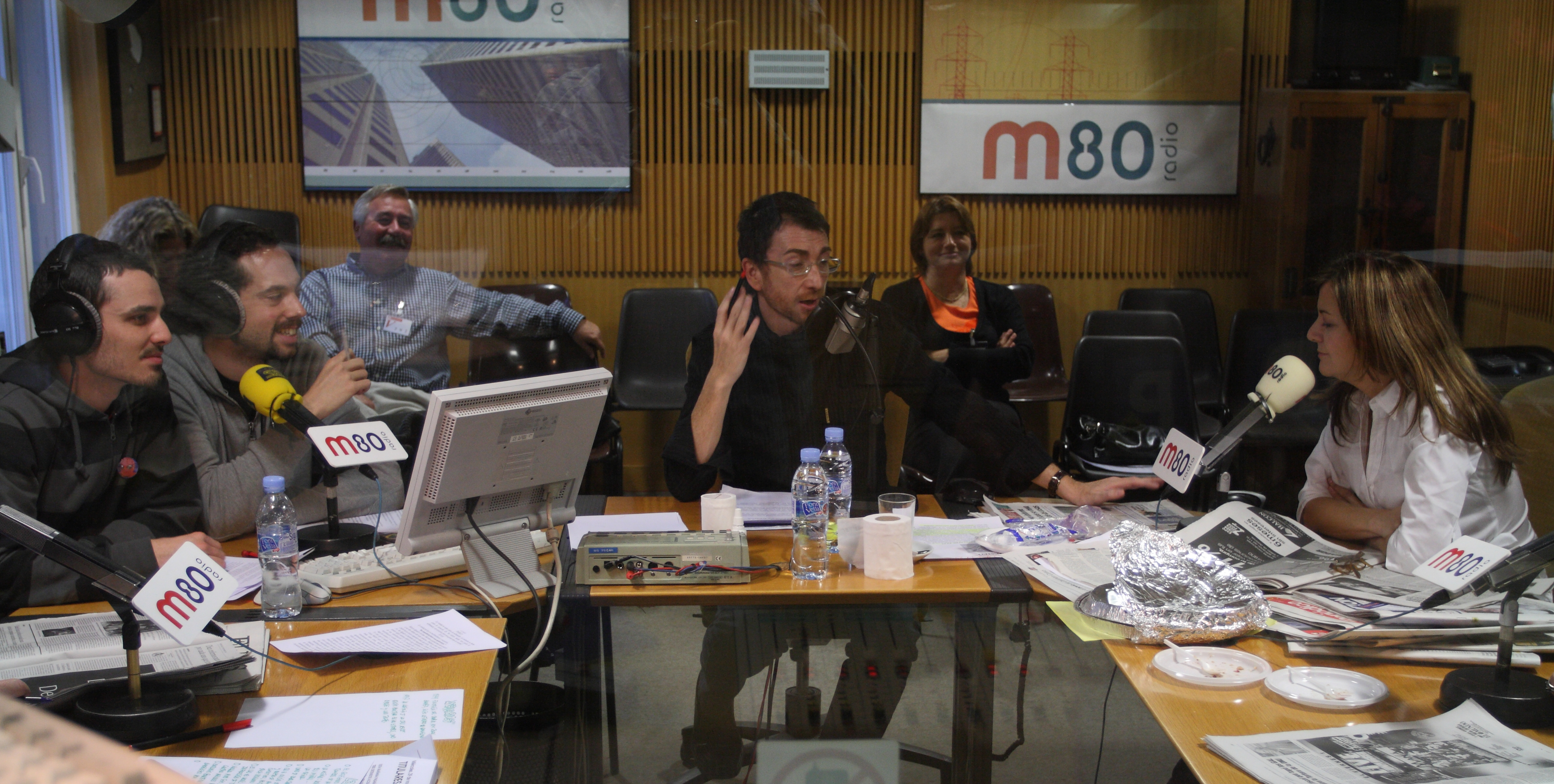 No Somos Nadie, M80 (Pablo Motos, Juan y Damian en 2006)